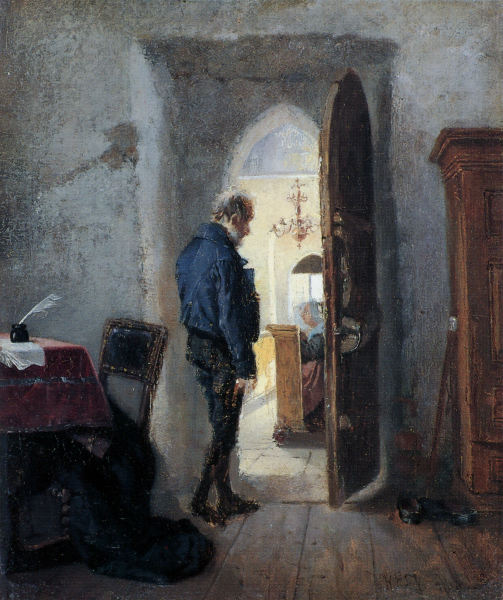 Vanha lukkari An old sexton. Karl Emanuel Jansson (1874).